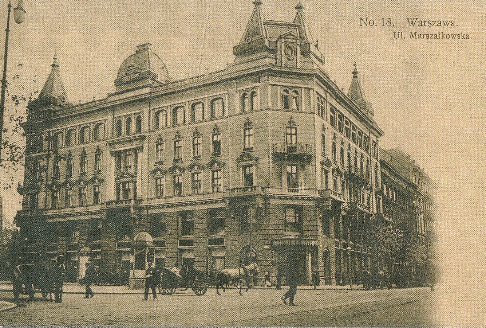 Ulica Marszałkowska róg Kredytowej w Warszawie. Kamienica, w której znajdował sie Dom Mody Bogusława Hersego